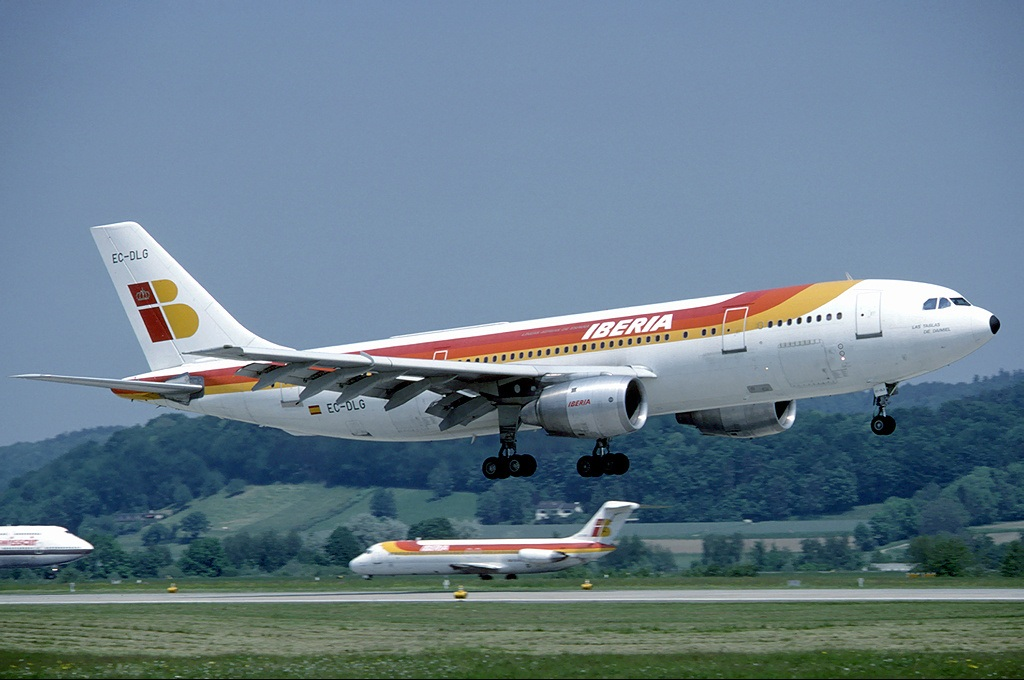 Airbus A300B4-120 Zurich (- Kloten) (ZRH / LSZH) Switzerland, May 1985 EC-DLG (cn 135) "Tablas de Daimiel"